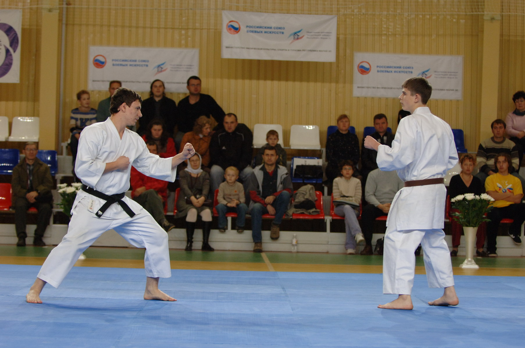 Каратэ в Йошкар-Оле (Сетокан)